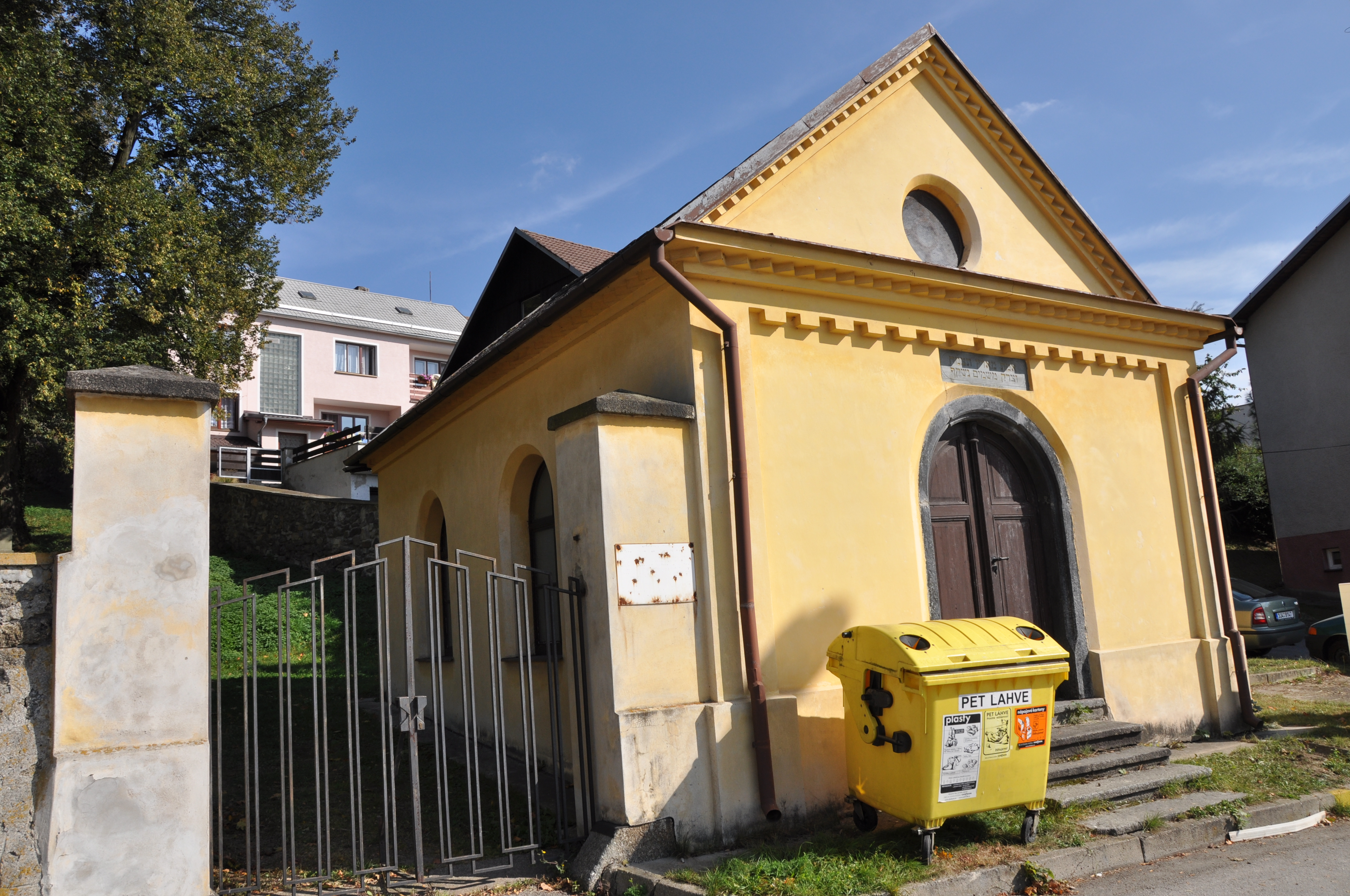 Márnice u židovského hřbitova ve Velkém Meziříčí